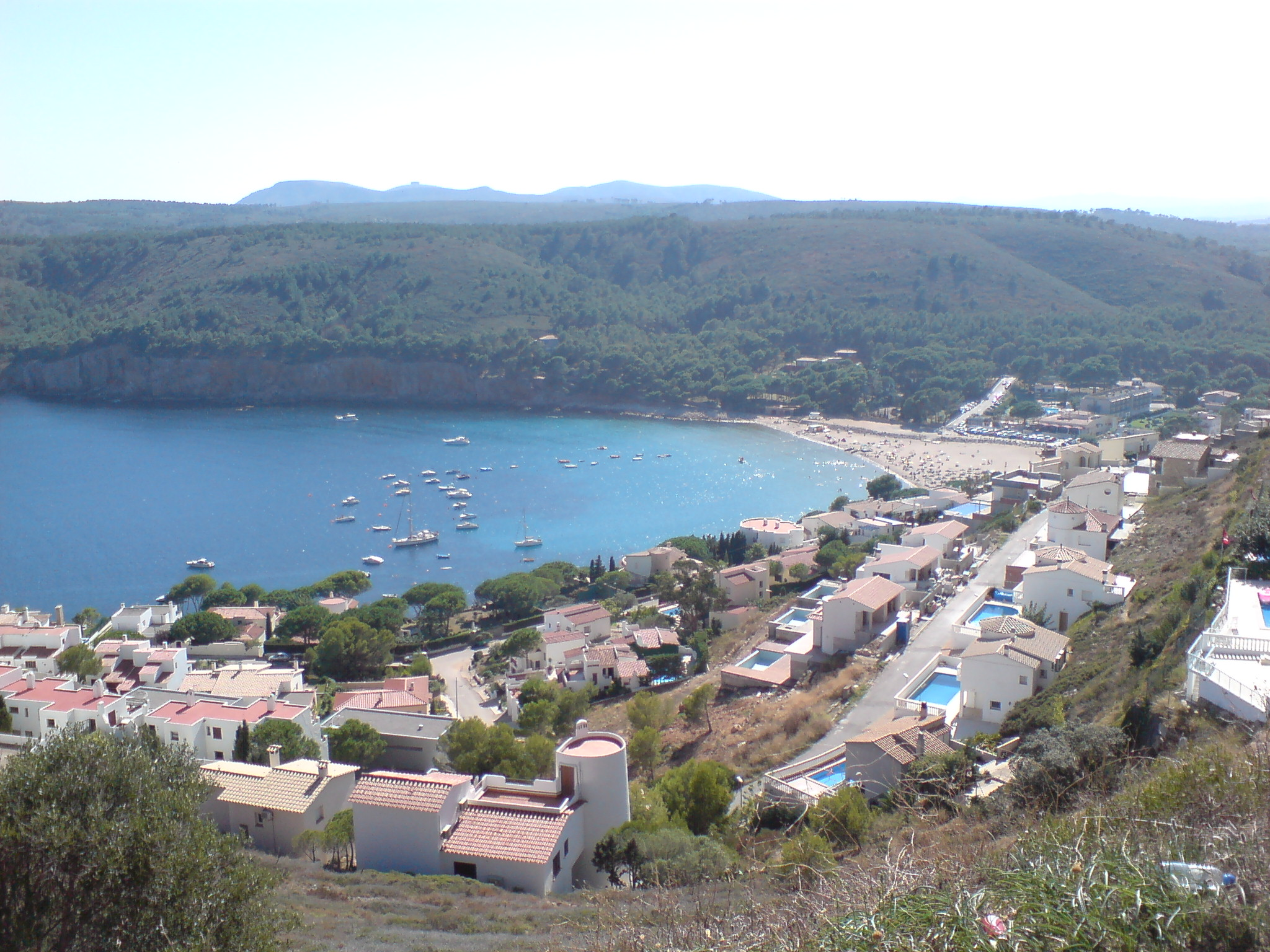 Vista de Cala Montgó des del Cap de Montgó